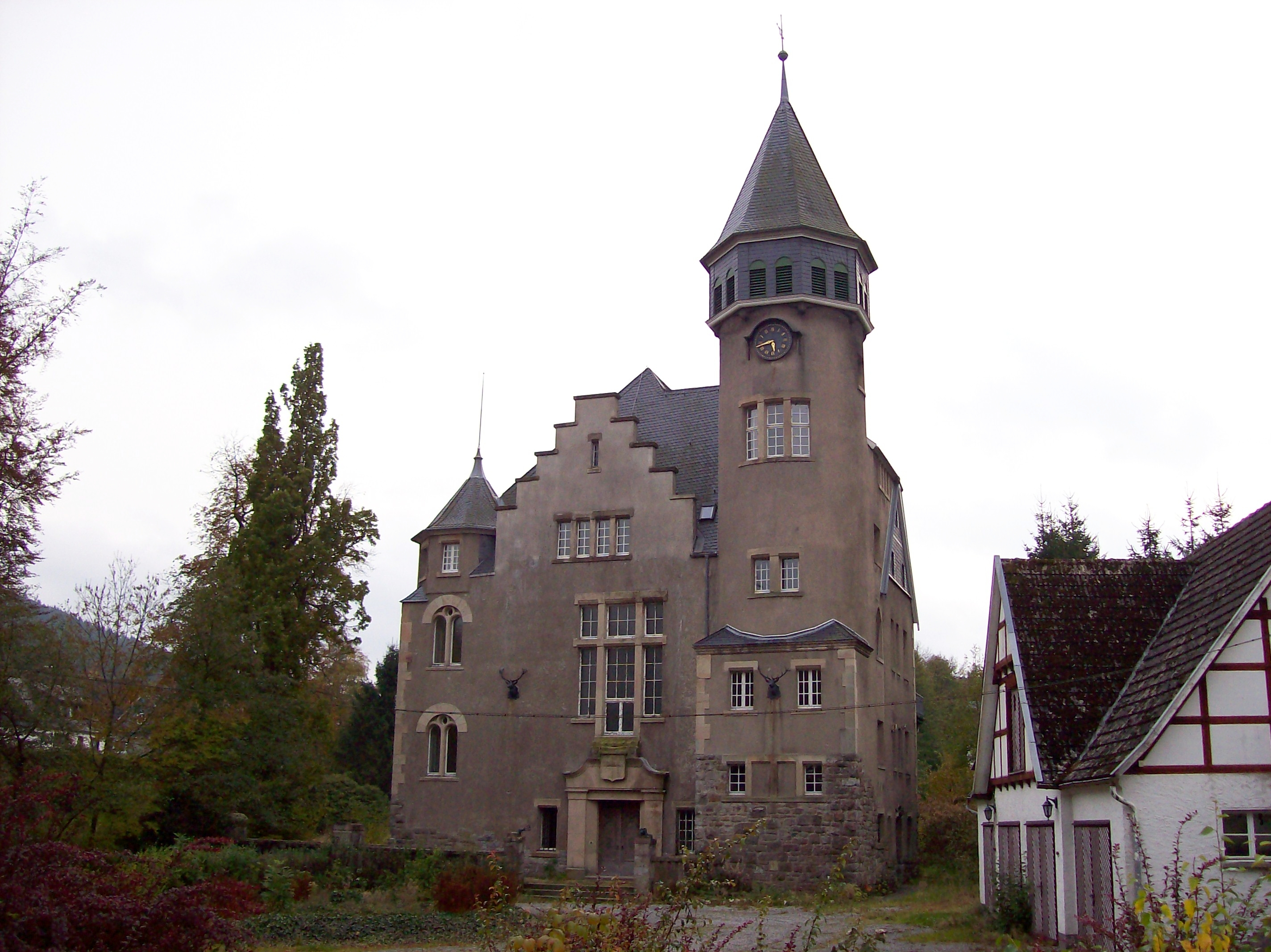 Schloss Wildenberg, Olsberg-Brunskappel (Germany)